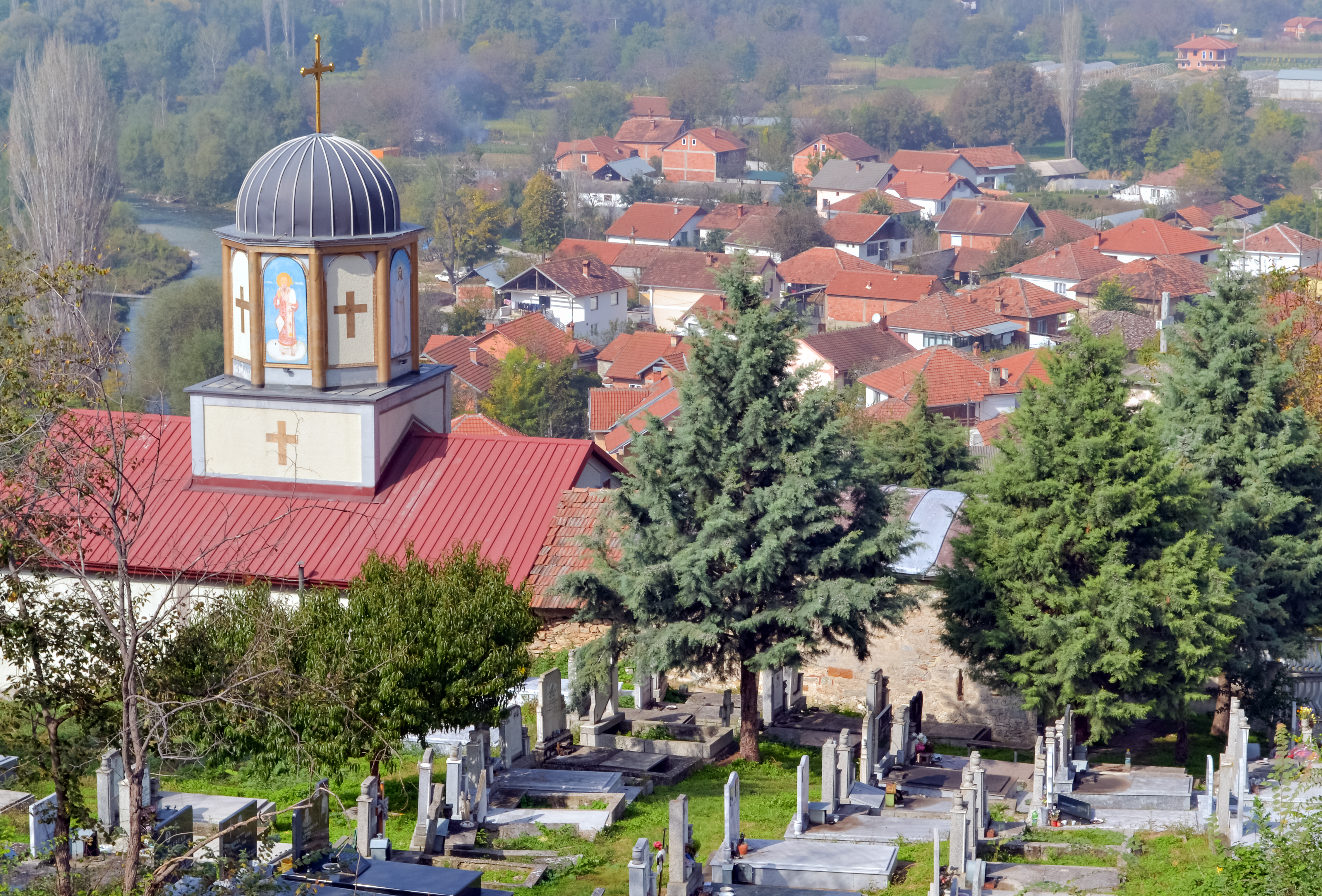 Црква Св. Атанасие во село Шишево, Скопско